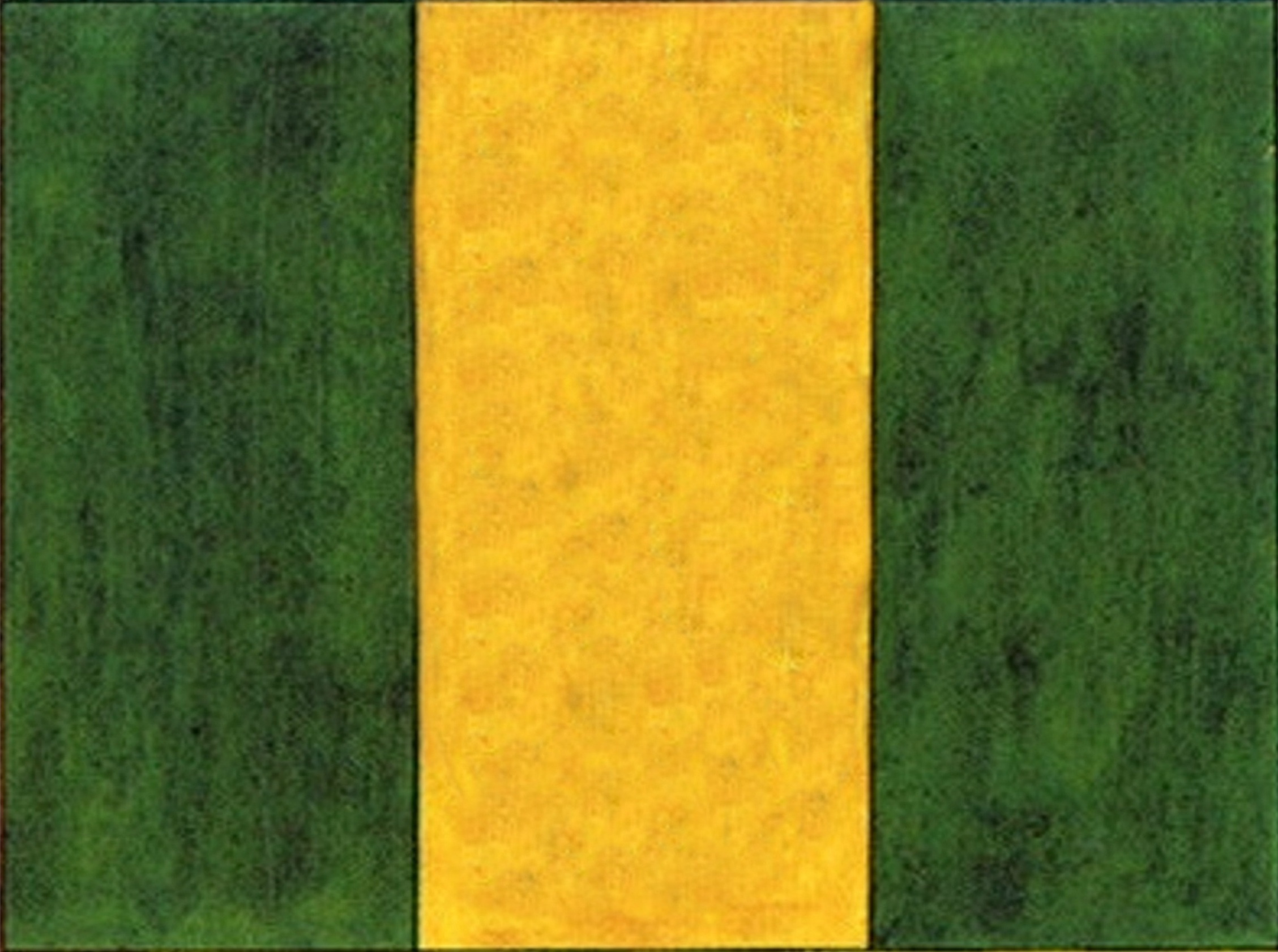 Bandera de Pradejón